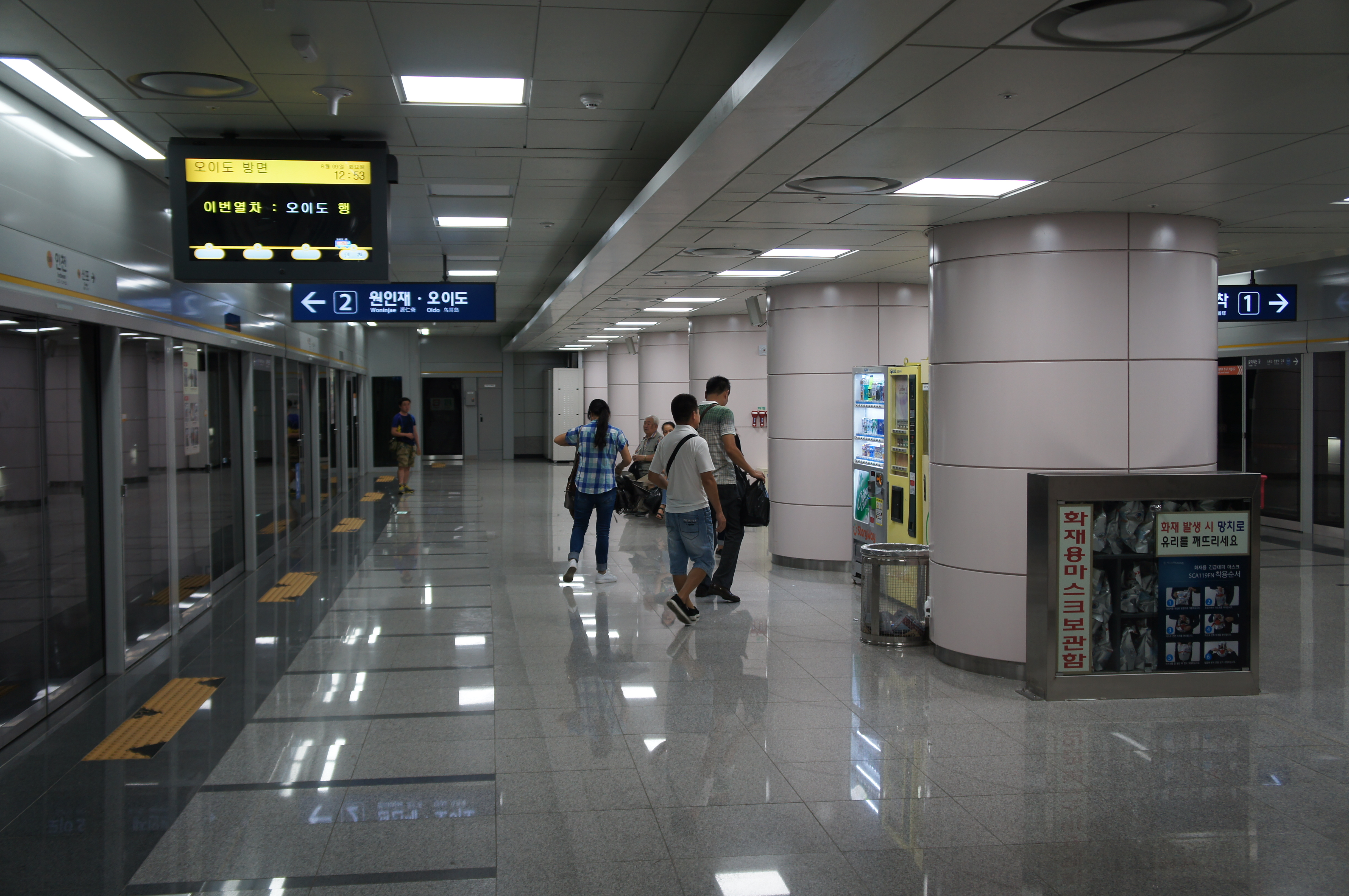 인천역 수인선 승강장